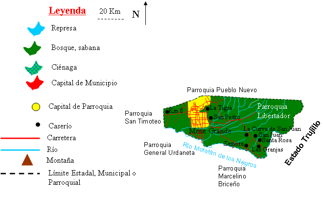 Mapa Parroquia Libertador, Municipio Baralt, Estado Zulia, Venezuela